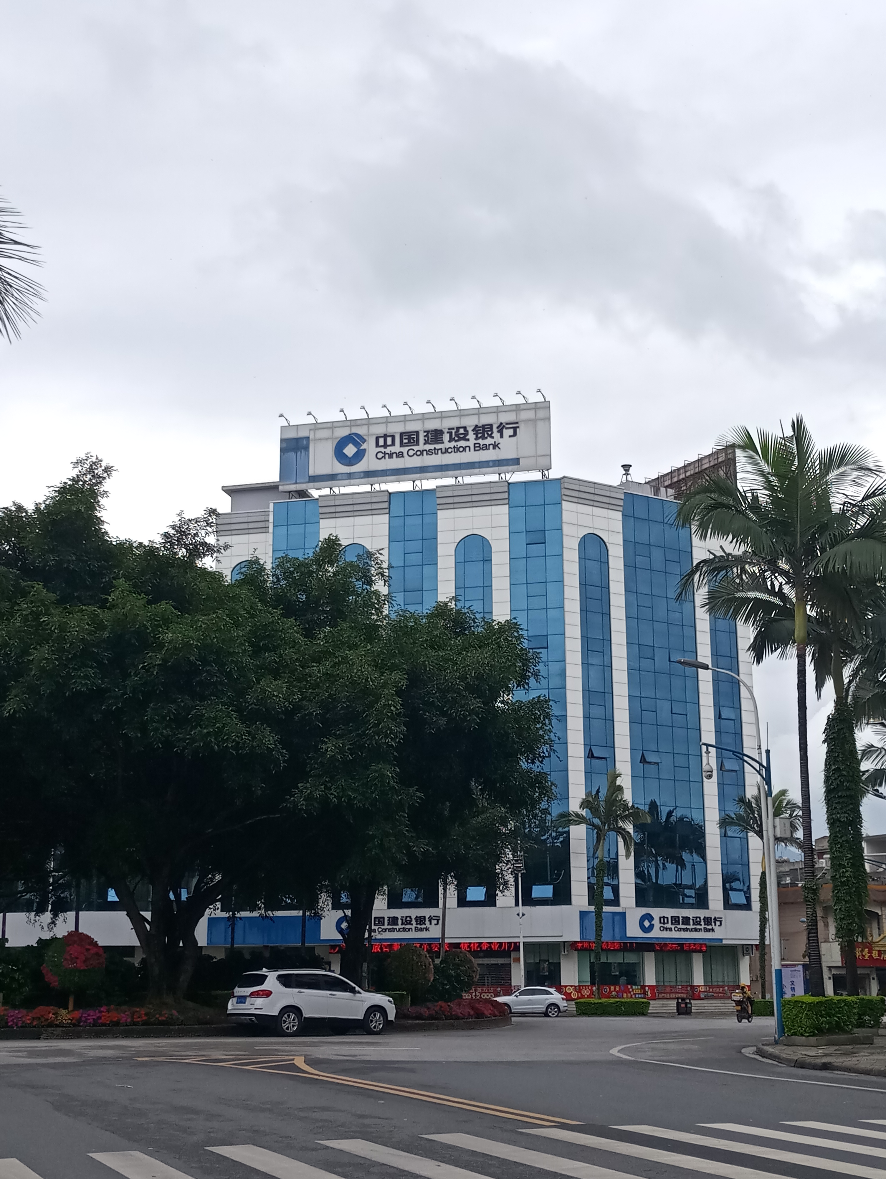 中国建设银行德宏州分行